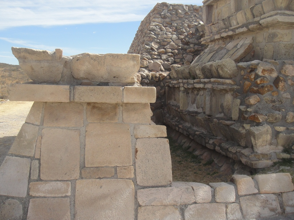 Template:Plazuelas, casas tapadas, construction stages detail